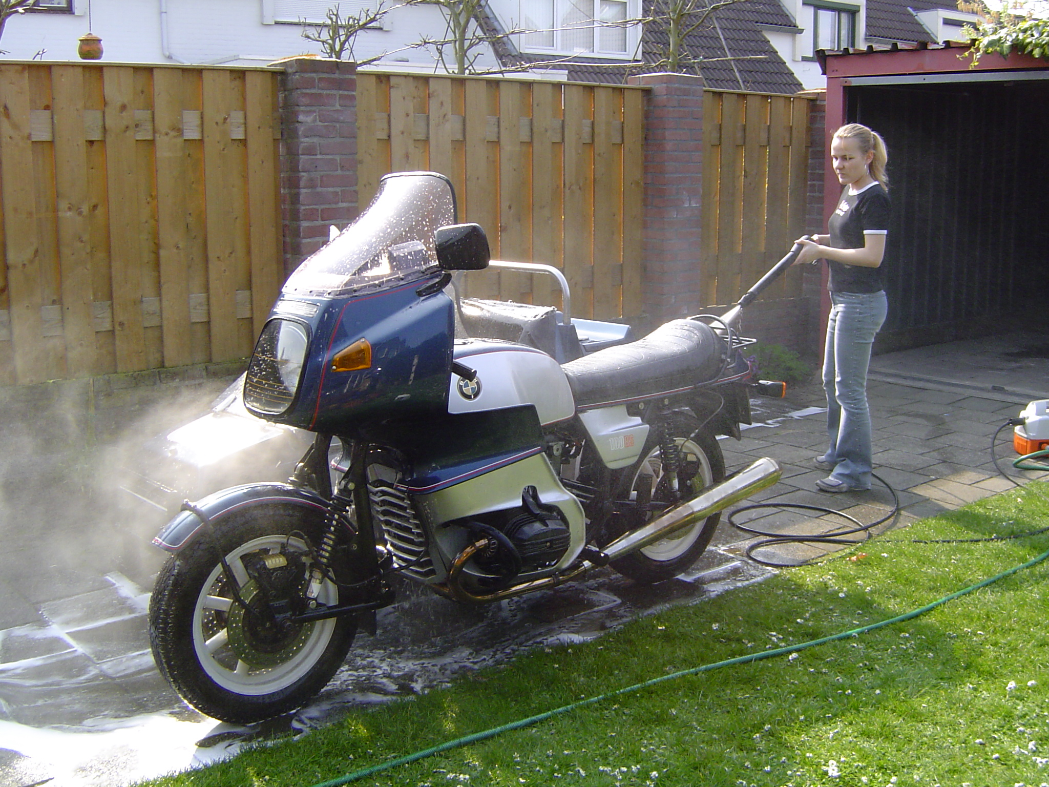 Lanze eines Hochdruckreinigers.